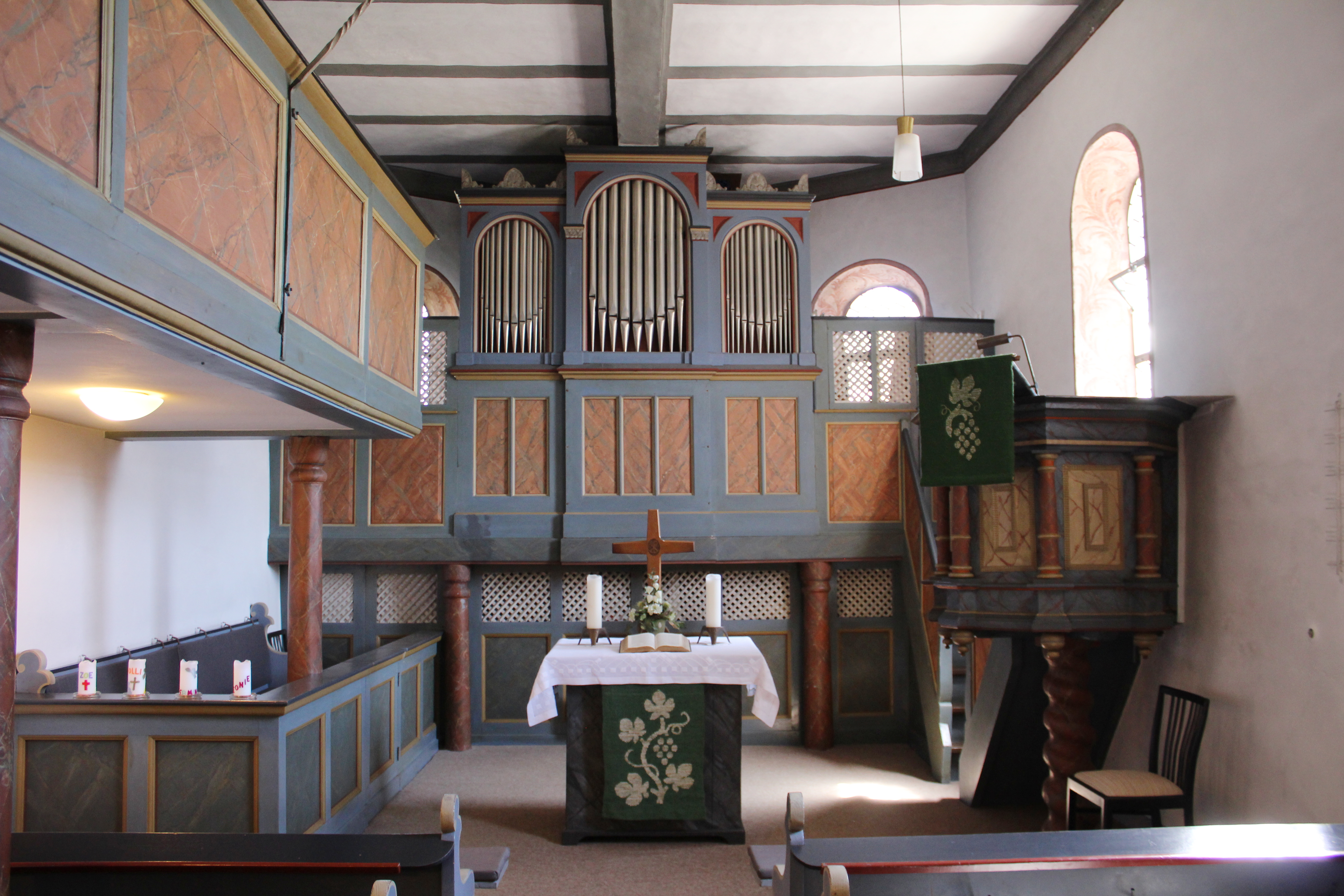 Evangelische Kirche Oberquembach, Gemeinde Schöffengrund, Hessen, Deutschland